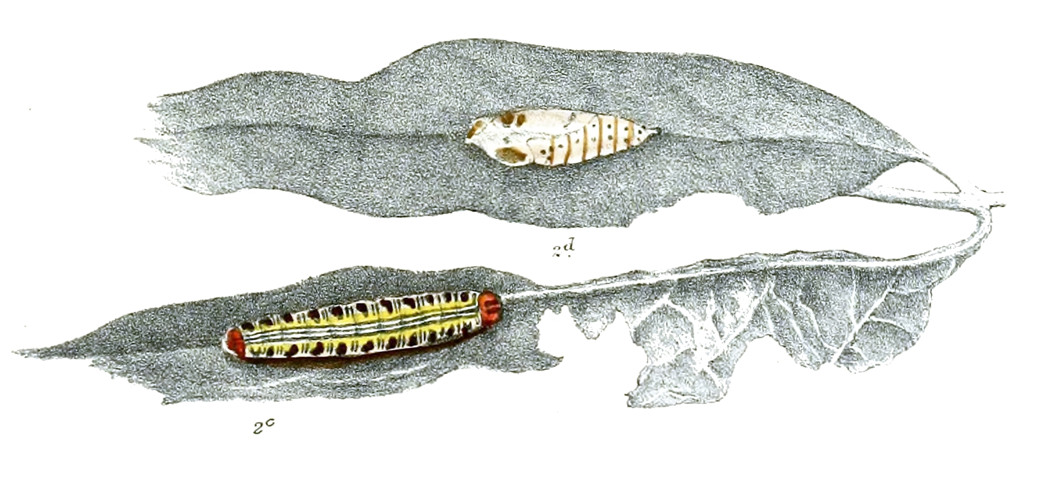 Bibasis sena; larva and pupa